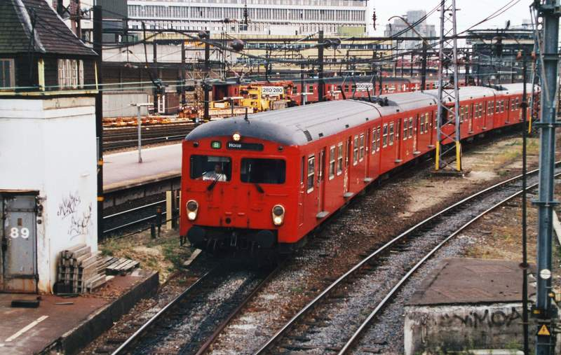 S-train in Copenhagen, 1997